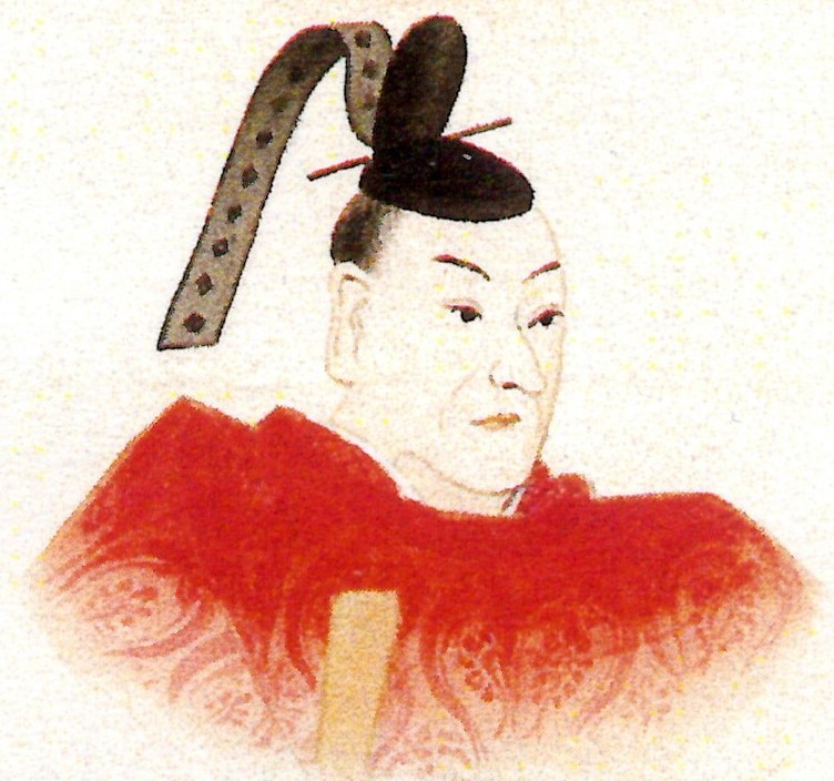 板倉勝晙の肖像。